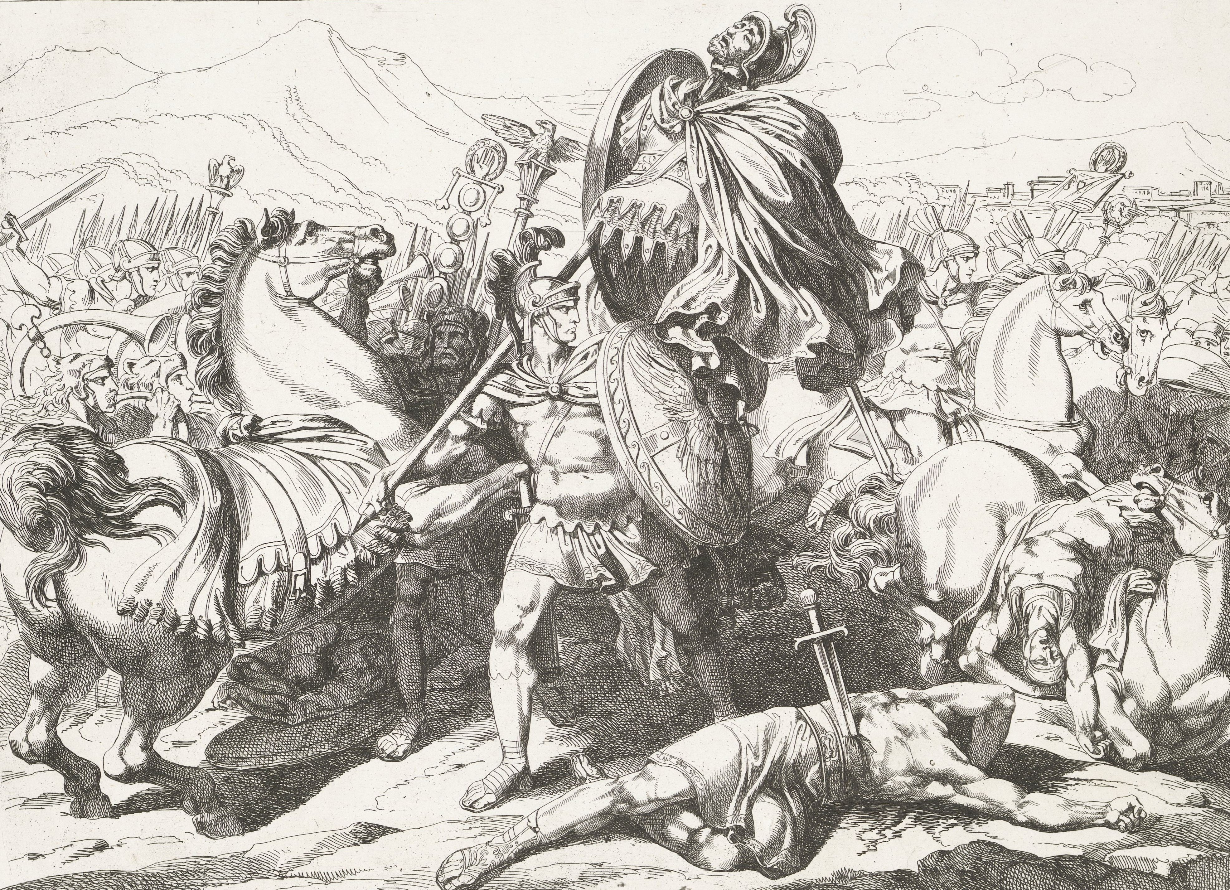 IdentificatieTitel(s): Aulus Cornelius Cossus doodt Lars TolumniusA. Cornelio Cosso, uccide di propria mano Larte Tolumnio Ré de'Vejenti, e ne consagra le spoglie opime, al Tempio di Giove Feretrio (titel op object)Geschiedenis van het Romeinse Rijk (serietitel)Frontespizio della Istoria Romana (serietitel)Objecttype: prent Serienummer: 33/101Objectnummer: RP-P-1929-200Catalogusreferentie: Marini&Fagiolo 33Opschriften / Merken: verzamelaarsmerk, verso, gestempeld: Lugt 2228opschrift, recto midden onder, handgeschreven in inkt: ‘A. Cornelius Cossus, doodt met eigen hand L. Tolumnius, Koning der Veji, en wijdt diens wapen- / rusting, door eigen hand ontnomen, aan den tempel van Jupiter Feretrius.’Omschrijving: Aulus Cornelius Cossus heeft Lars Tolumnius gedoodt met een zWaar: d. Hij staat triomfantelijk met diens wapenrusting op het slagveld.VervaardigingVervaardiger: prentmaker: Bartolomeo Pinelli (vermeld op object)naar eigen ontwerp van: Bartolomeo Pinelli (vermeld op object)Plaats vervaardiging: RomeDatering: 1818Fysieke kenmerken: etsMateriaal: papier Techniek: etsenAfmetingen: plaatrand: h 316 mm × b 425 mmToelichtingDeze prent maakt deel uit van een reeks van 101 prenten over de geschiedenis van Rome.OnderwerpWat: violent death by swordde soldaat; het leven van een soldaatVerwerving en rechtenCredit line: Schenking van J.J. de Man, EdeVerwerving: schenking 1929Copyright: Publiek domein